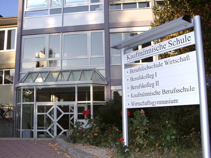 Kaufmännische Schule Tauberbischofsheim (KSTBB), Hinweisschild, Schularten